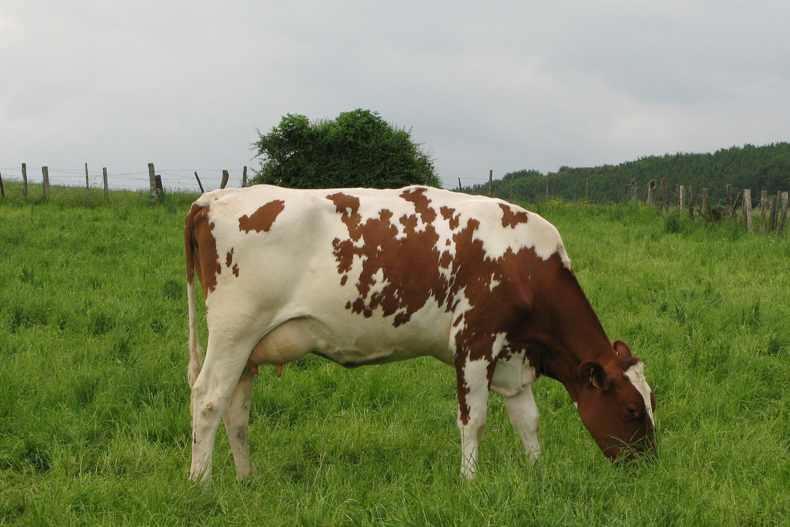 Kou vun der Rass Red Holstein. Kategorie:Rëndsrassen